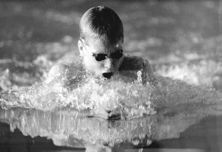 Christian Poswiat ADN-ZB Oberst 20.12.88 potsdam: DDR-Wintermeisterschaften im Schwimmen- Der Berliner Christian Poswiat (SC Dynamo) holte sich den Meistertitel auf der 25-m-Bahn über 100-m-Brust in 1:01,40 min. Diese Leistung ist neue DDR-Bestzeit für Kurzbahnen.